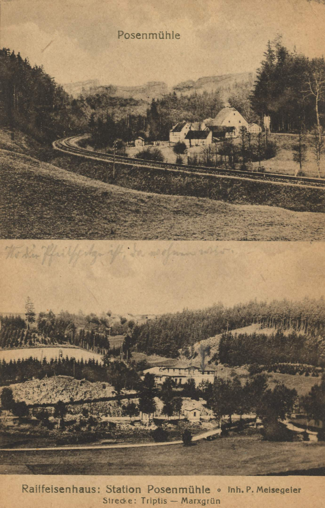 Die Posenmühle bei Knau, Pension Raiffeisenhaus, Bahnhaltepunkt Posenmühle an der Strecke Triptis-Marxgrün